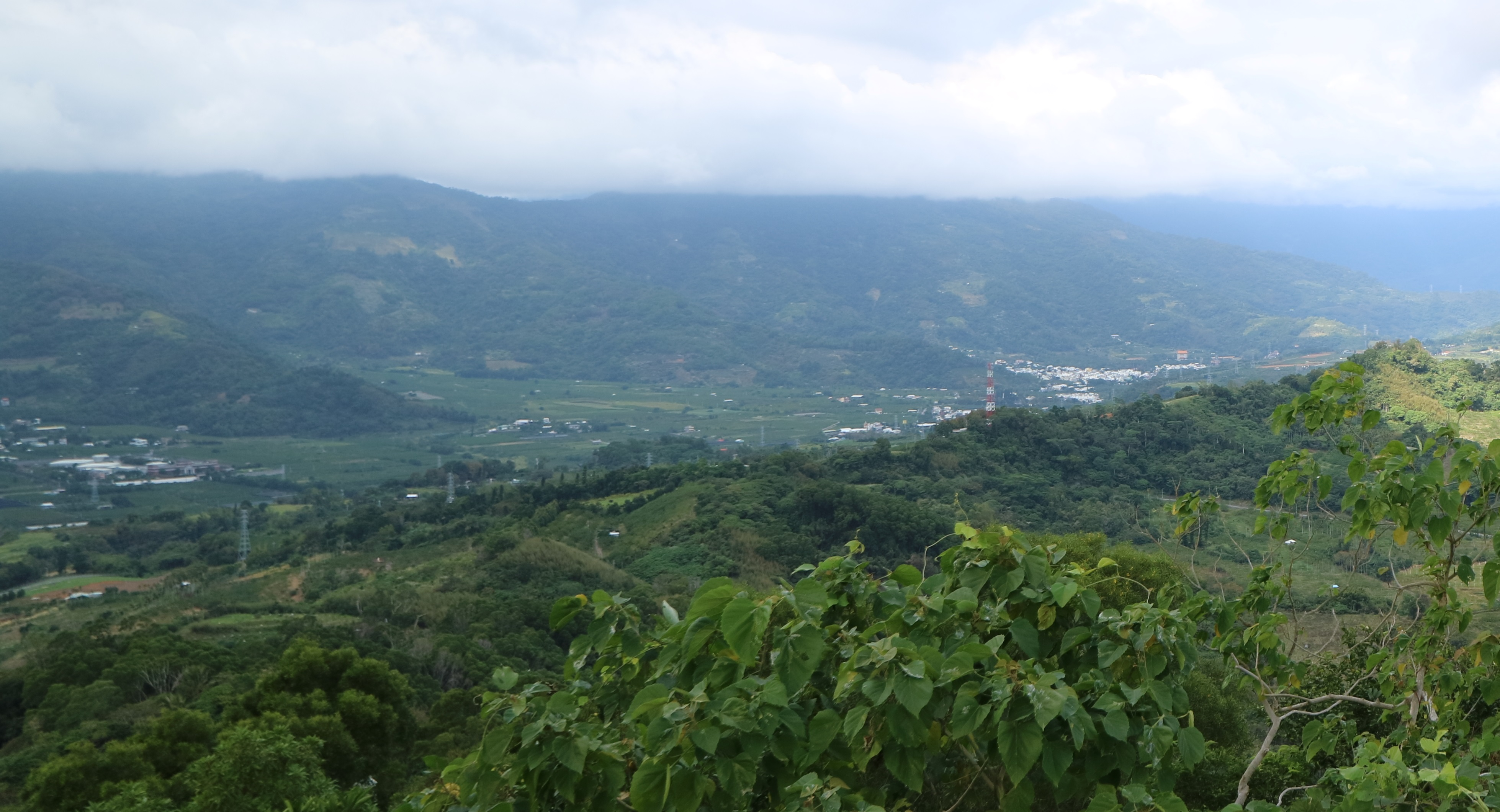 臺灣臺東縣卑南鄉初鹿村山谷左邊為舊斑鳩溪沖積扇，中間為新斑鳩溪沖積扇，右邊為初鹿村市中心。